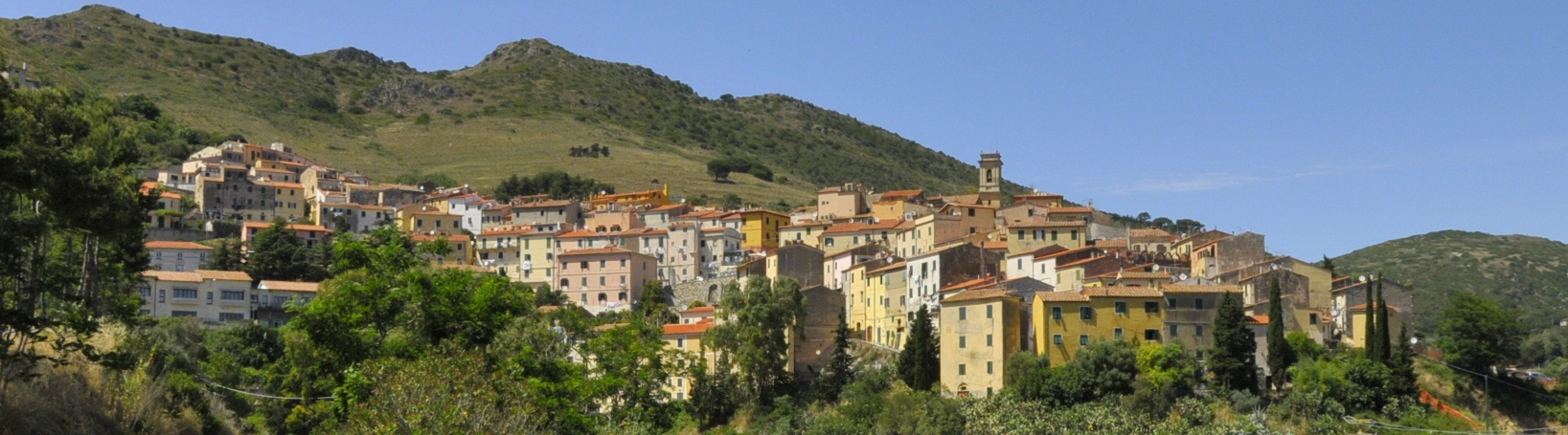 Rio nell'Elba gesamt